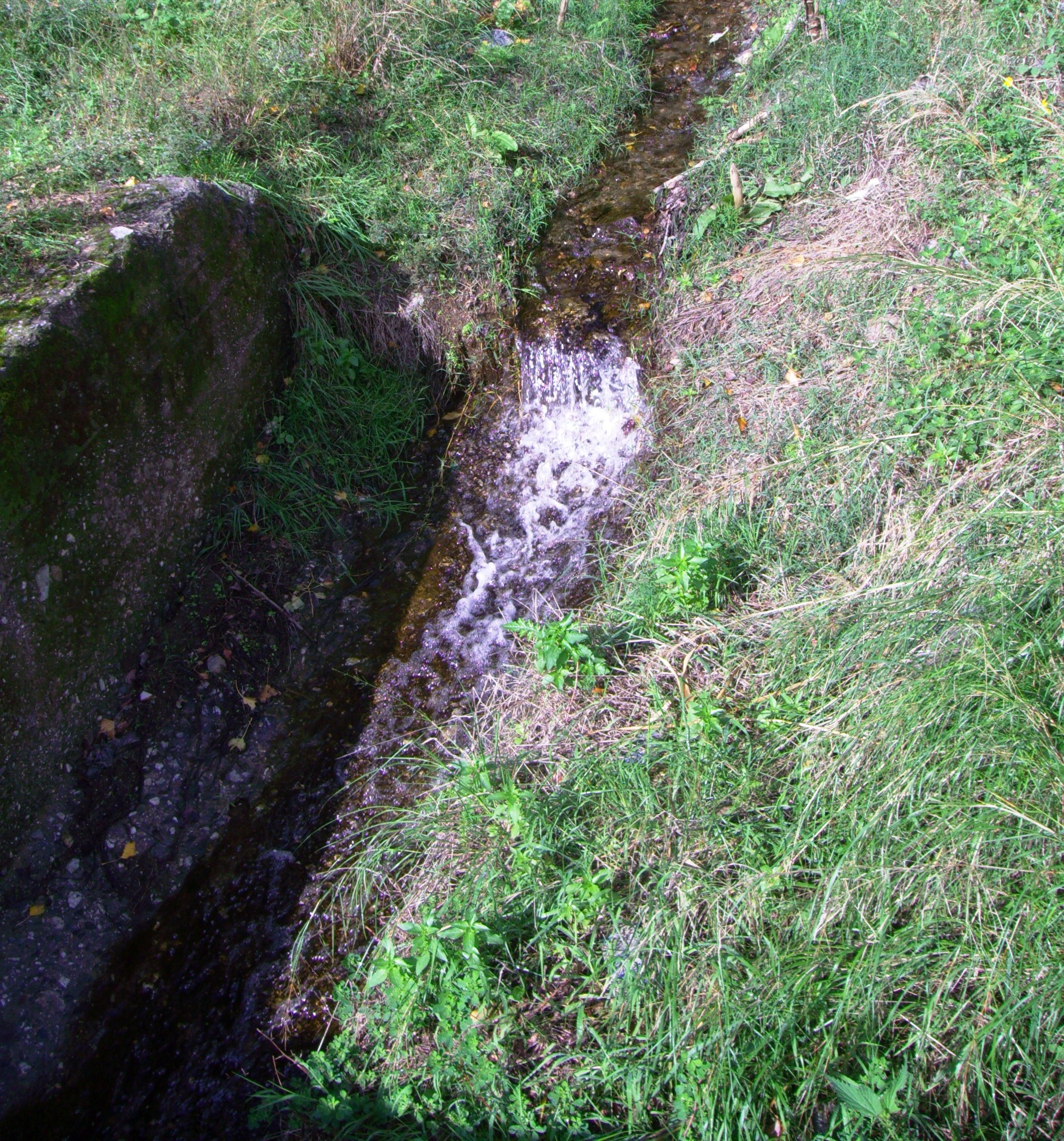 Il torrente Camaro in un tratto presso la fonte sui Perolitani.